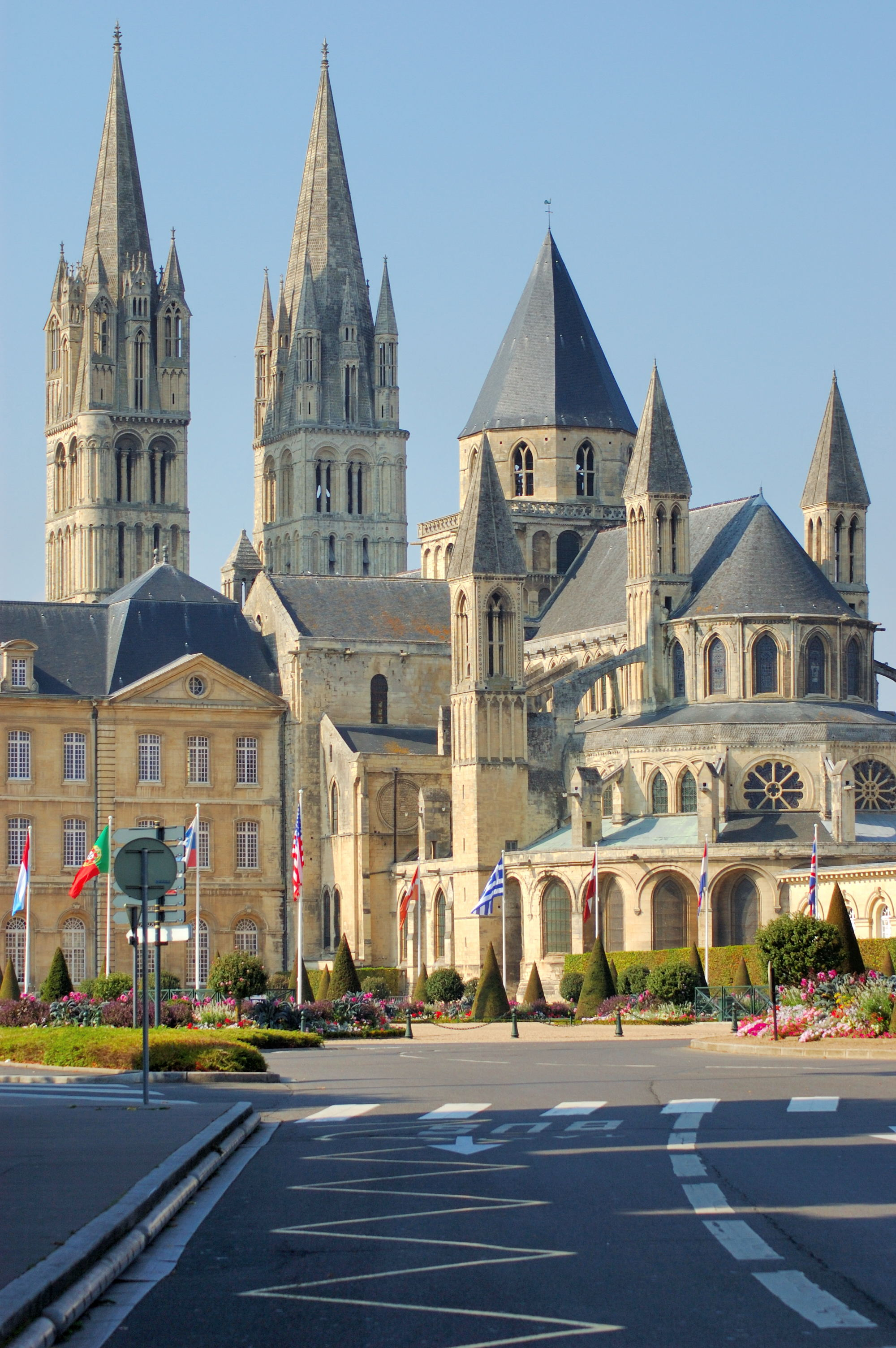 chevet de l'église Saint-Étienne de Caen (Calvados, Basse-Normandie).